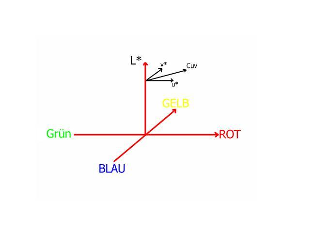 Luv-Farbraum